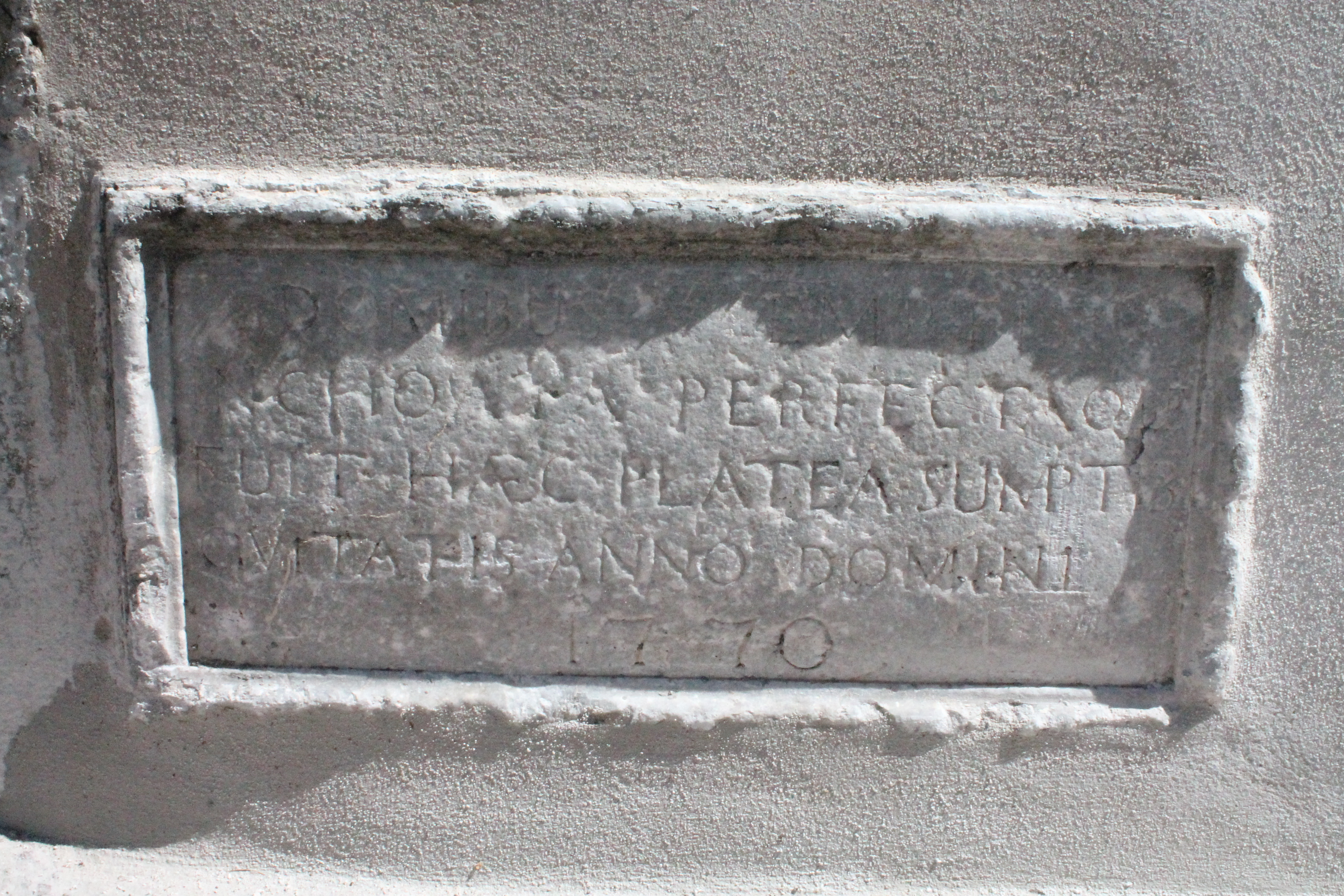 Inscription commémorative de la construction du quai de l'évêché, pierre gravée, 1770.